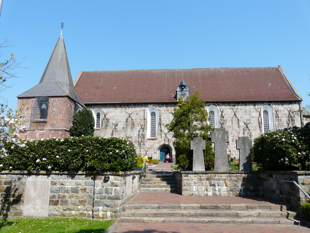 Kirche in Tettens (Church in Tettens)